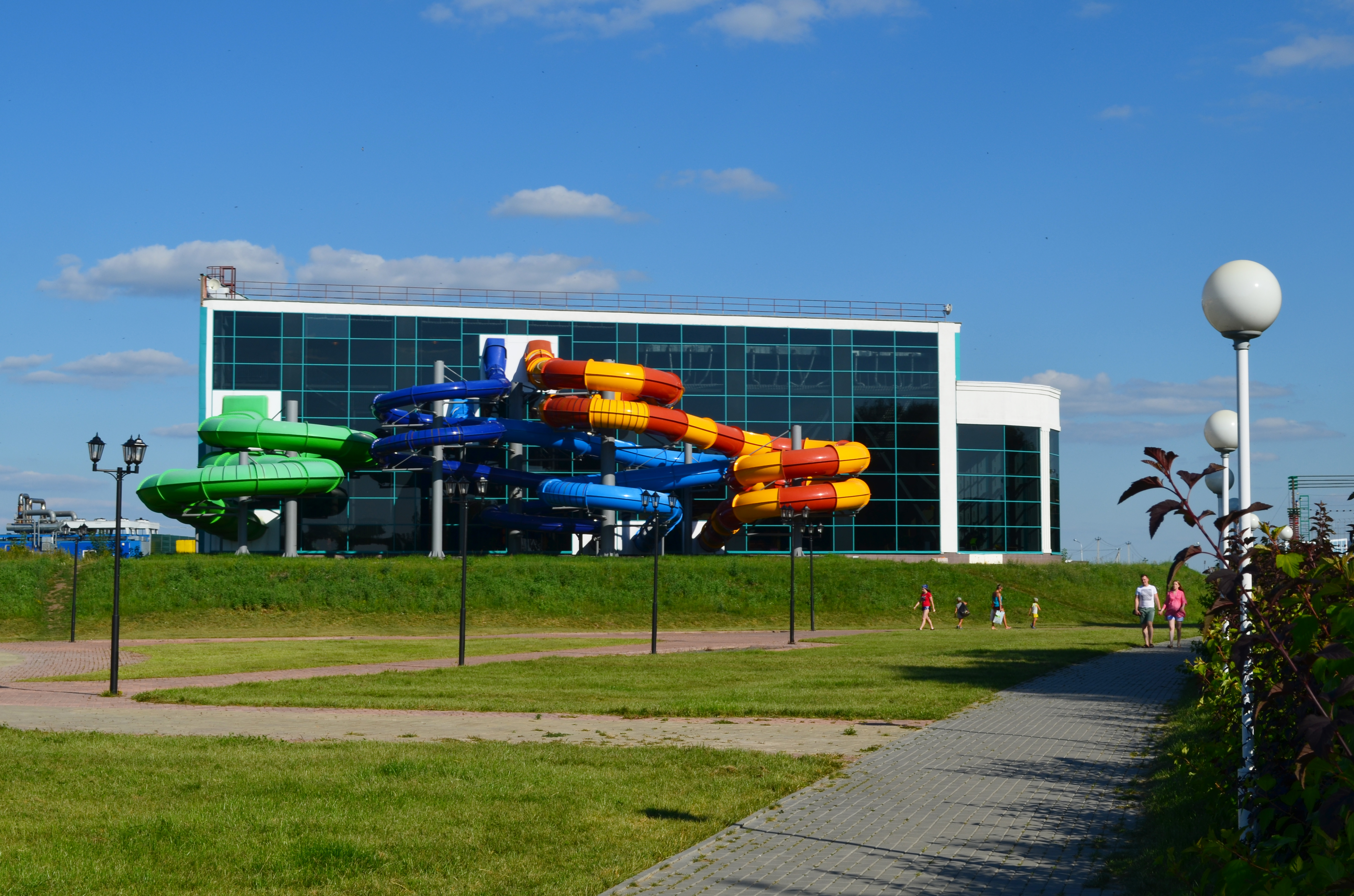 Аквапарк "Горки" под Рязанью.